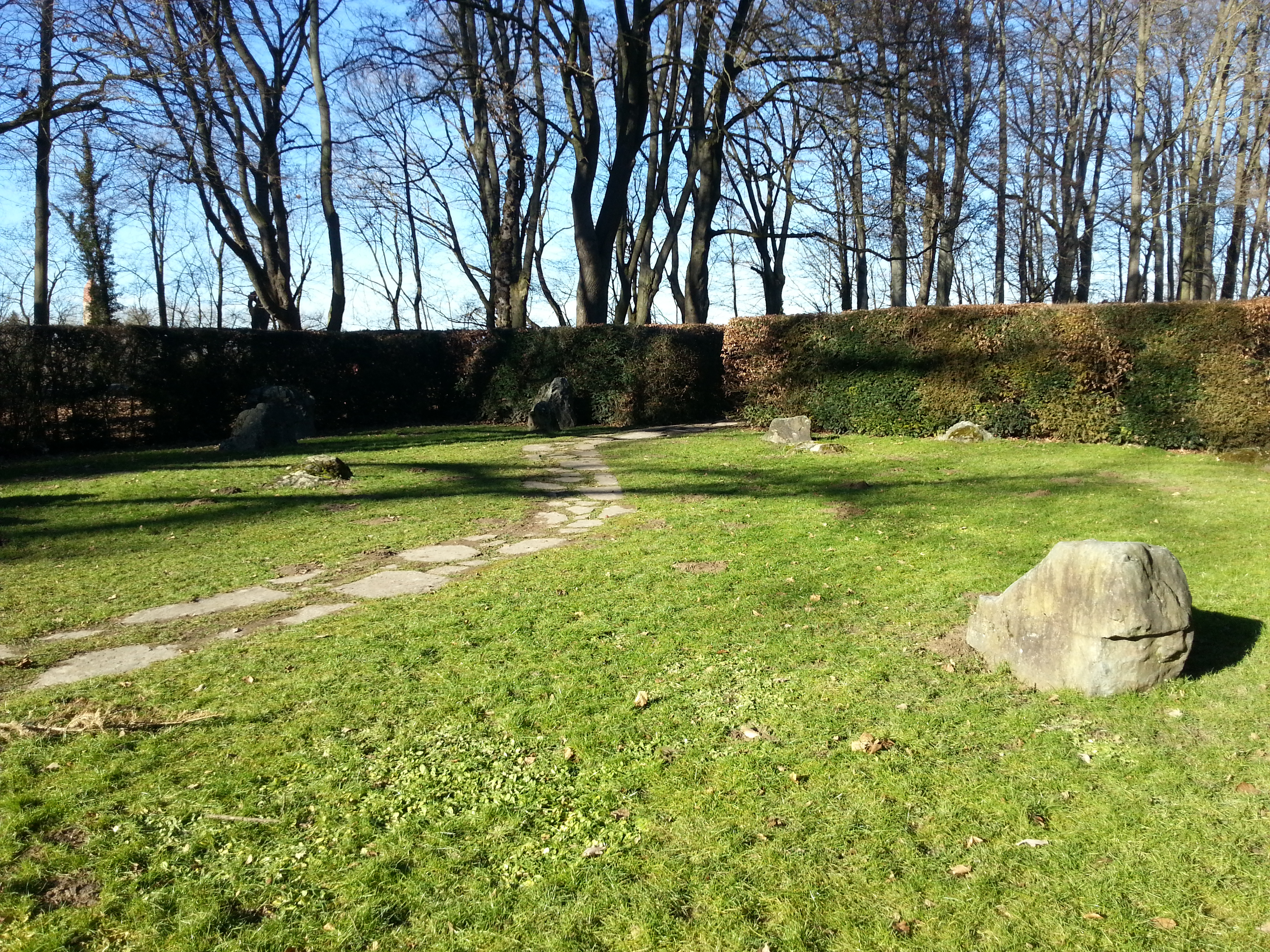 Japanischer Steingarten im Wittelsbacher Park Augsburg, Bayern